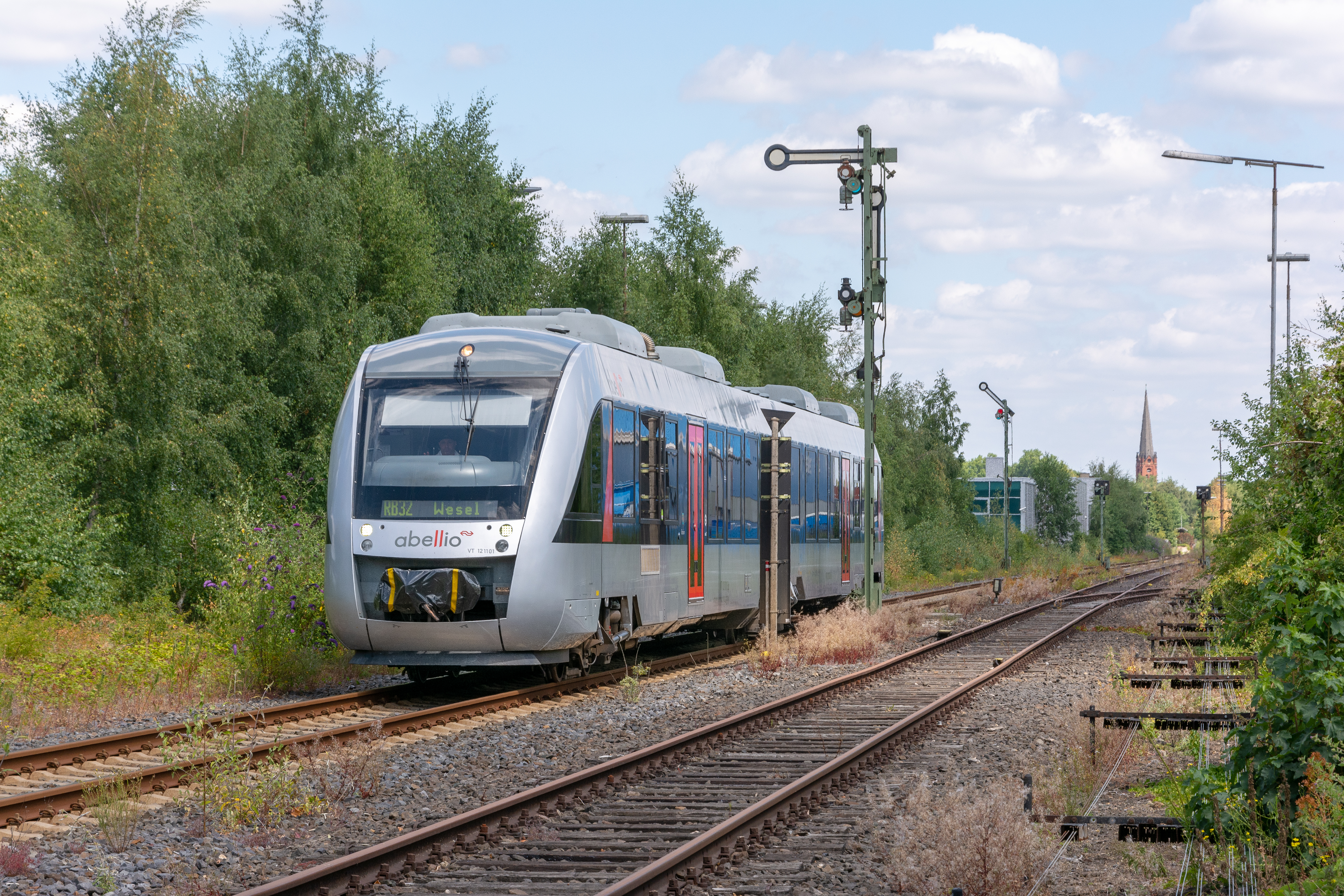 Nog altijd is Bocholt met nostalgische beveiliging uitgerust. Abellio Lint VT 121101 is zojuist vertrokken als RB32 naar Wesel. Over enige tijd (eind 2018) wordt hier begonnen met elektrificatie en zullen de dieseltreinen en wellicht de huidige beveiliging, verdwijnen.